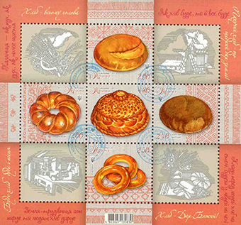 Блок марок України «Хліб» з п'яти марок та чотирьох купонів